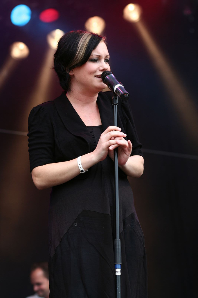 Sara Löfgren performing live during Stockholm Pride 2007